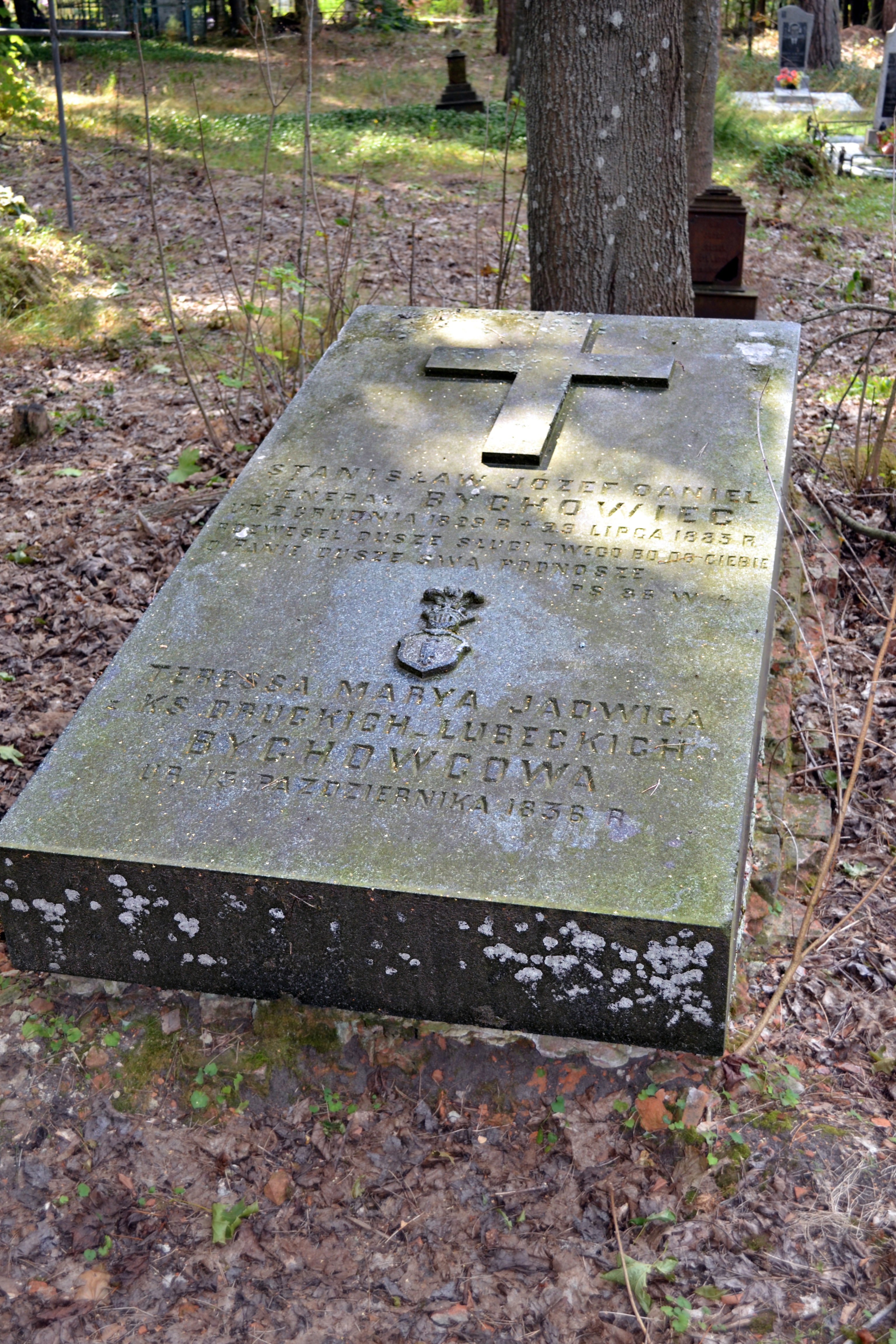 Беларуская (тарашкевіца): Надмагільле Станіслава Юзэфа Даніэля Быхаўца, генэрал-маёра расейскага войска, на могілках у вёсцы Барысікі (Пружанскі раён)